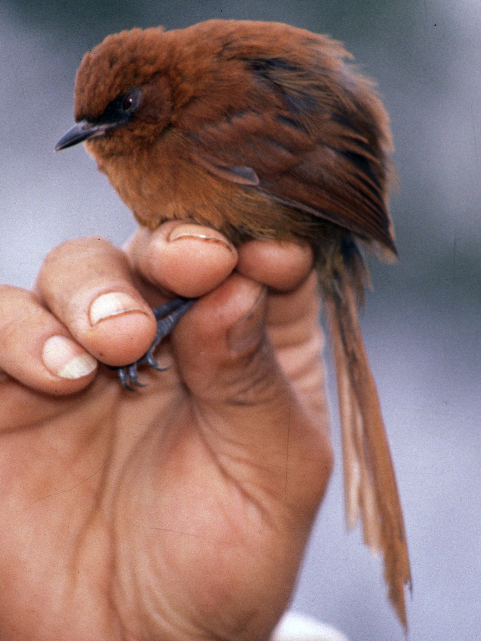 Rufous Spinetail (Synallaxis unirufa) from Ecuador